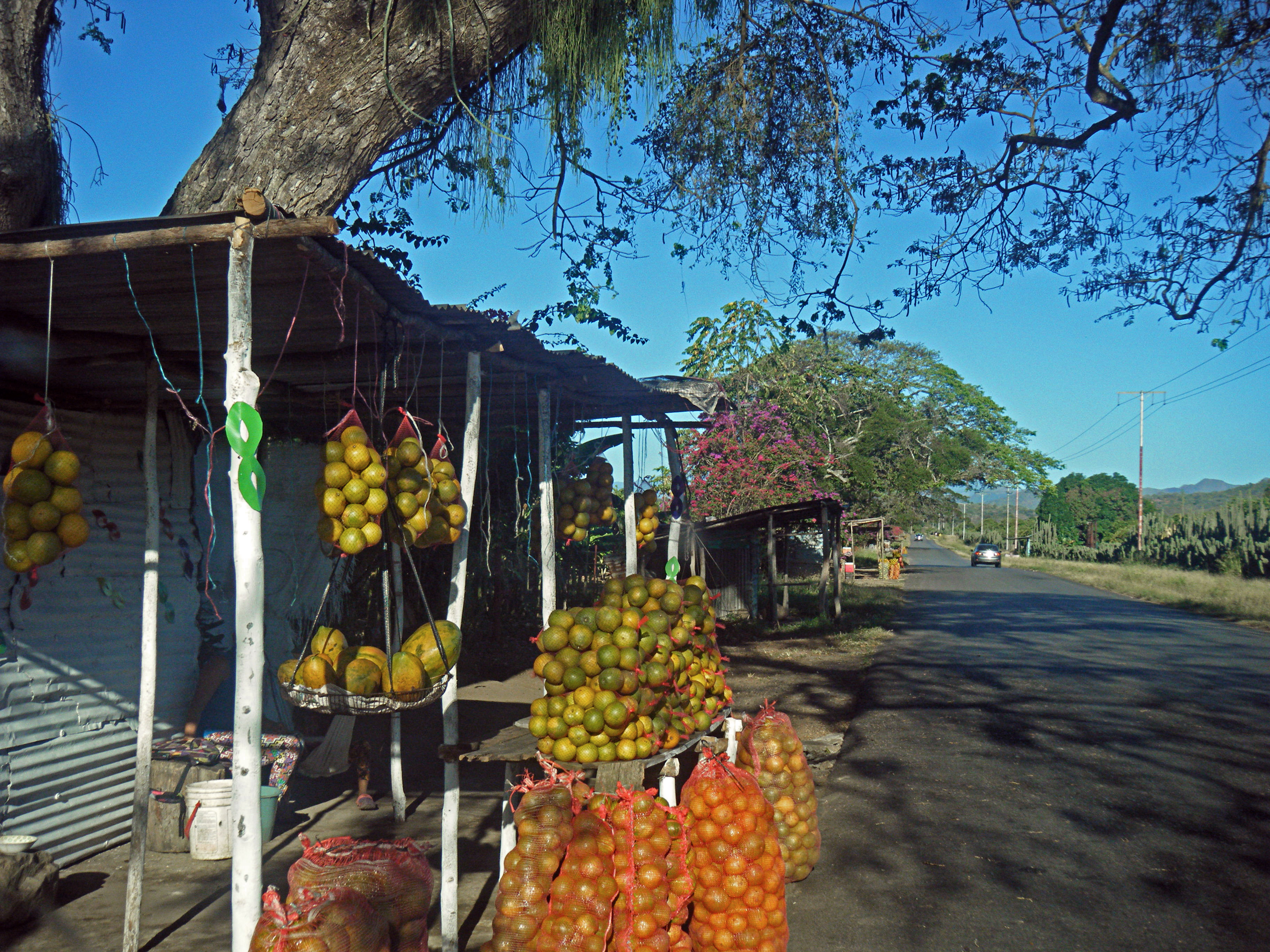 Ventas de naranjas por Aragua de Maturin, despues de Buena Vista. Estado Monagas.